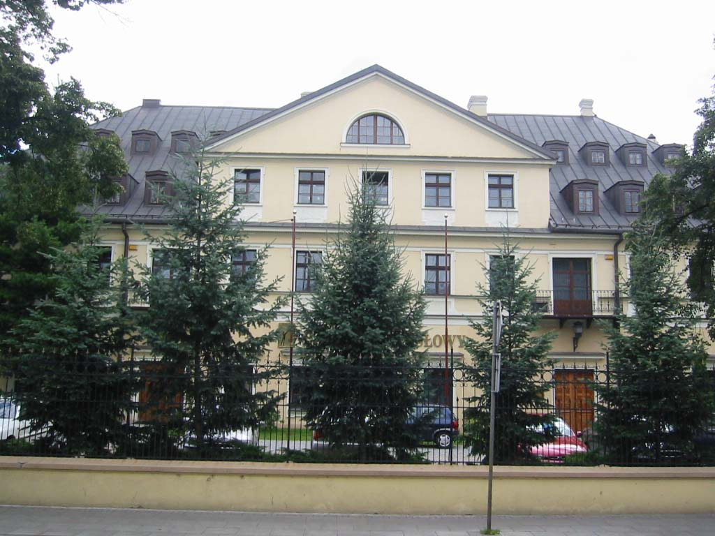 Dom Kopischa w Łodzi